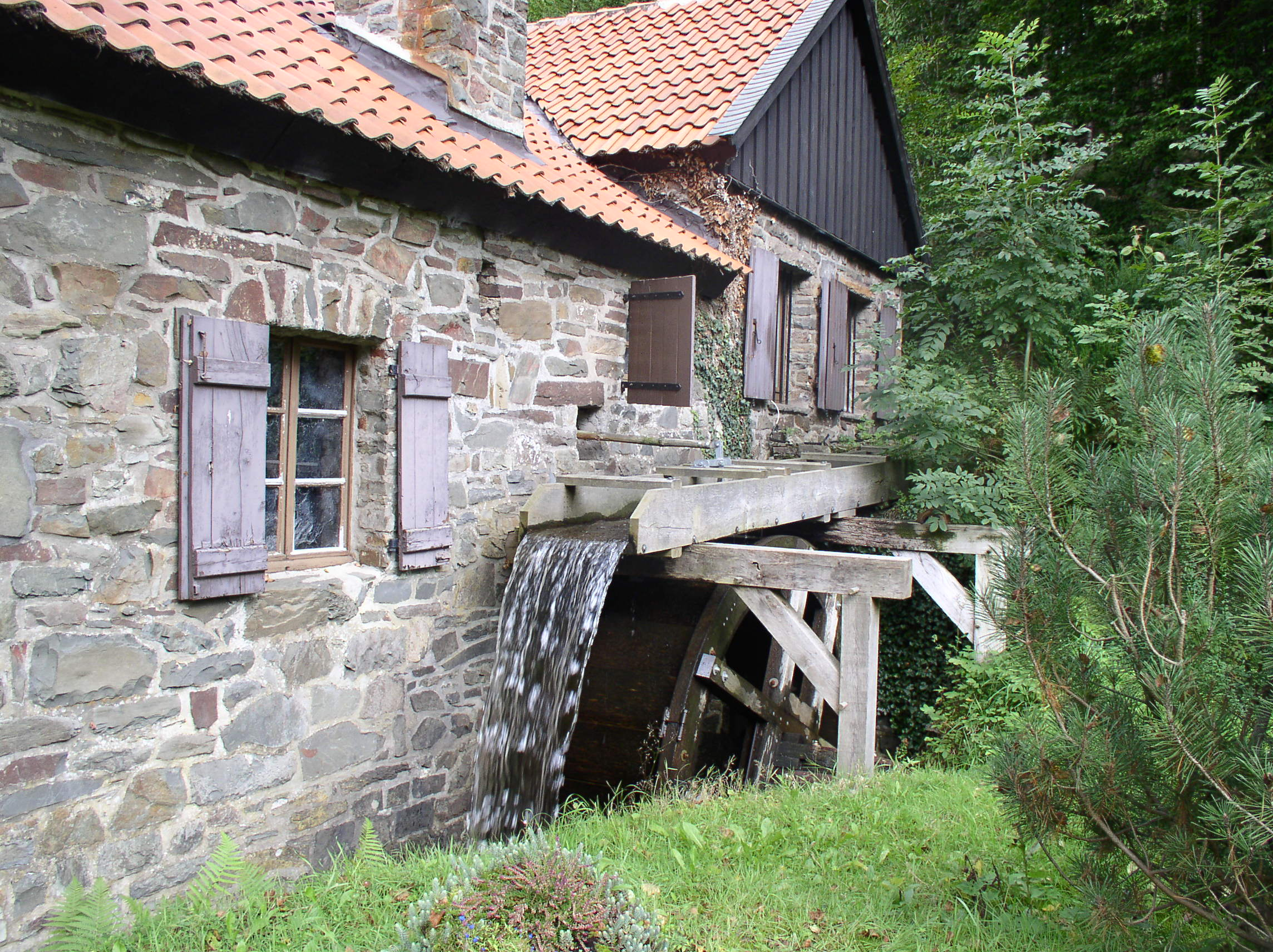 Brenscheider Ölmühle in Nachrodt-Wiblingwerde / Brenscheider oil mill in Nachrodt-Wiblingwerde